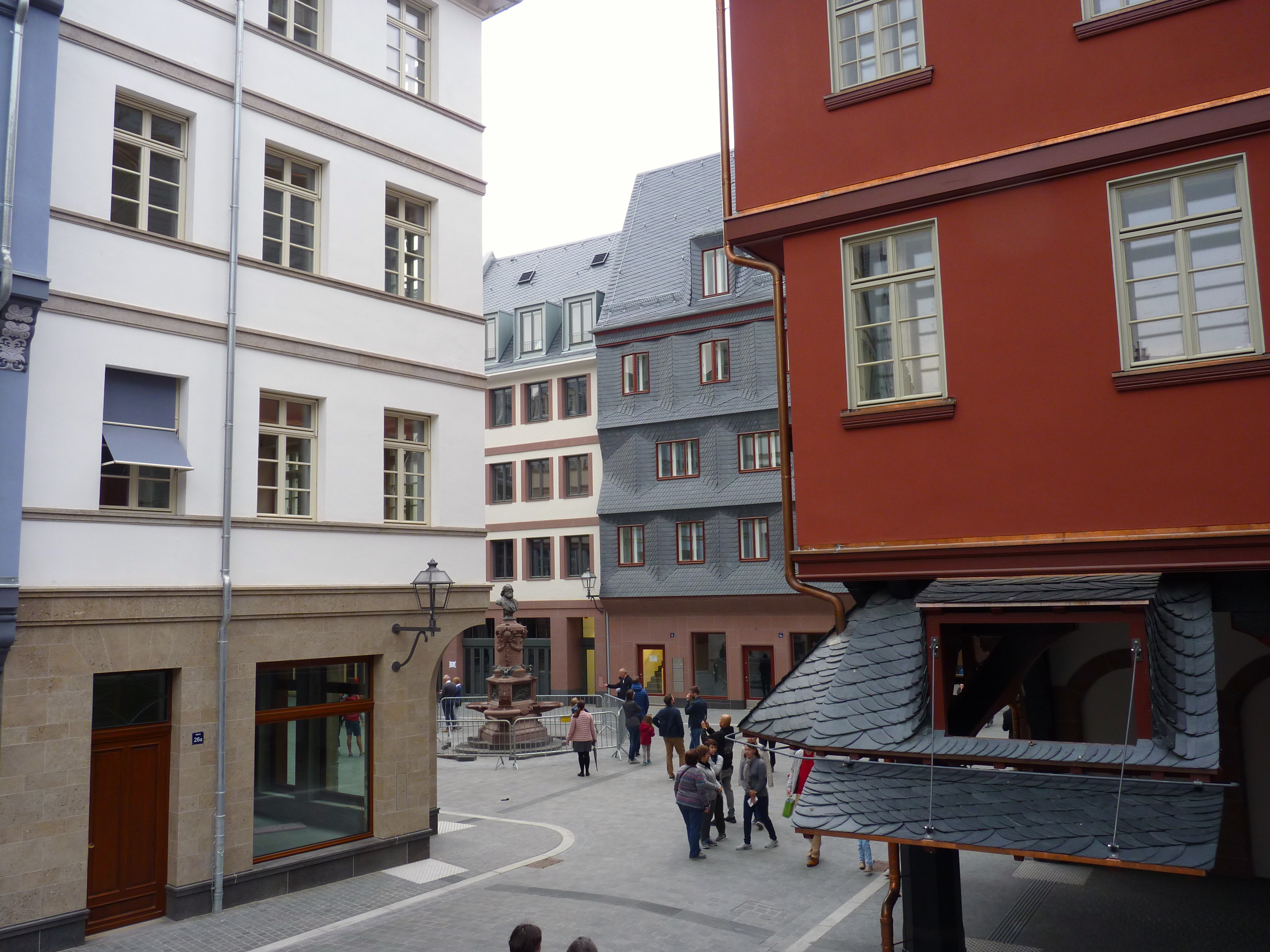 Blick vom Roten Haus Richtung Hühnermarkt. Von rechts die Häuser Rotes Haus (Markt 17, Nachbau des Neuen Roten Hauses), Neues Paradies (Markt 14, Johannes Götz + Guido Lohmann, Köln), Kleines Seligeneck (Markt 16, van den Valentyn, Köln), Schlegel (Markt 26, Nachbau)